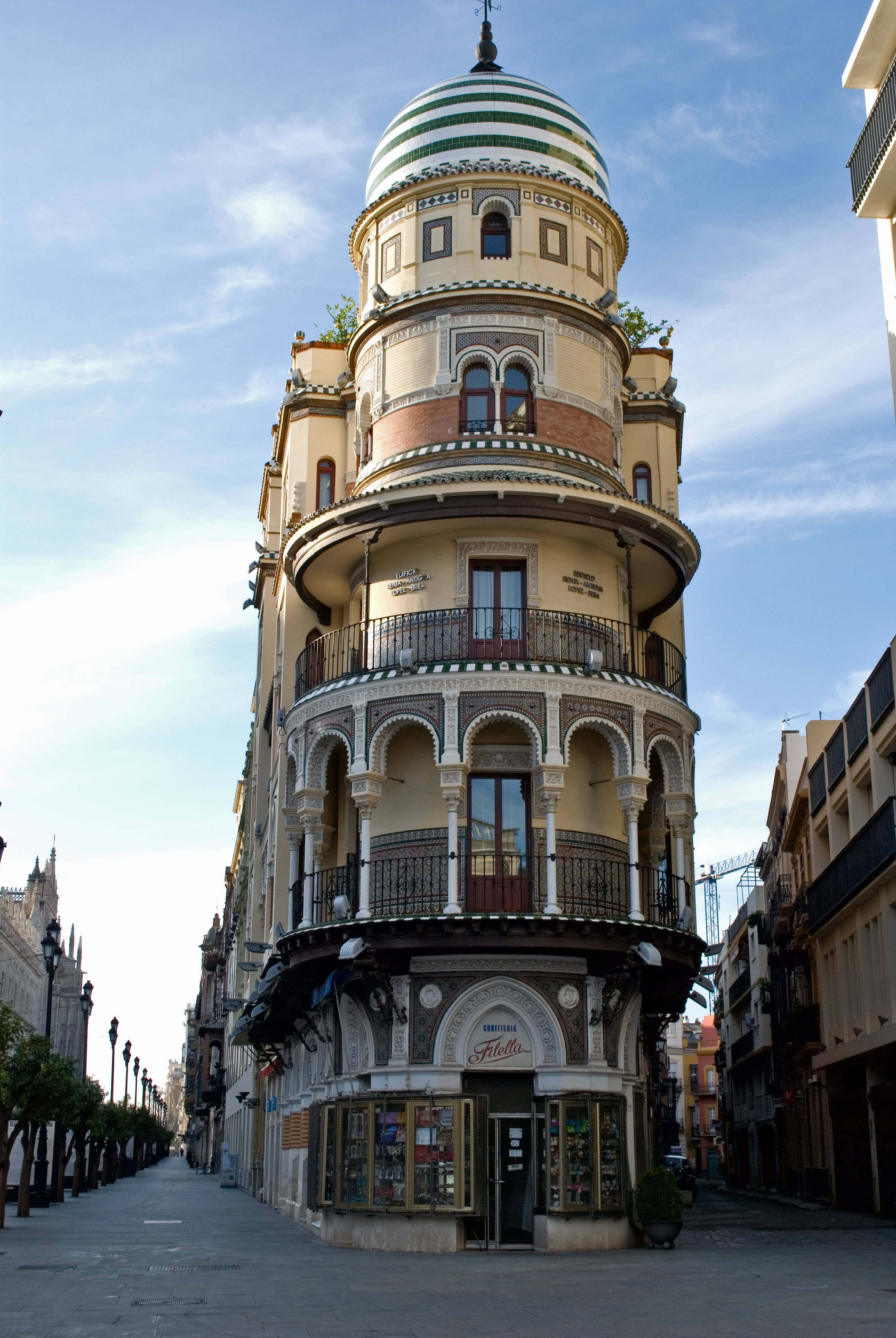 Edificio la Adriática, en la Avenida de la Constitución de Sevilla. Fue construido entre 1914 y 1922, arquitecto José Espiau y Muñoz